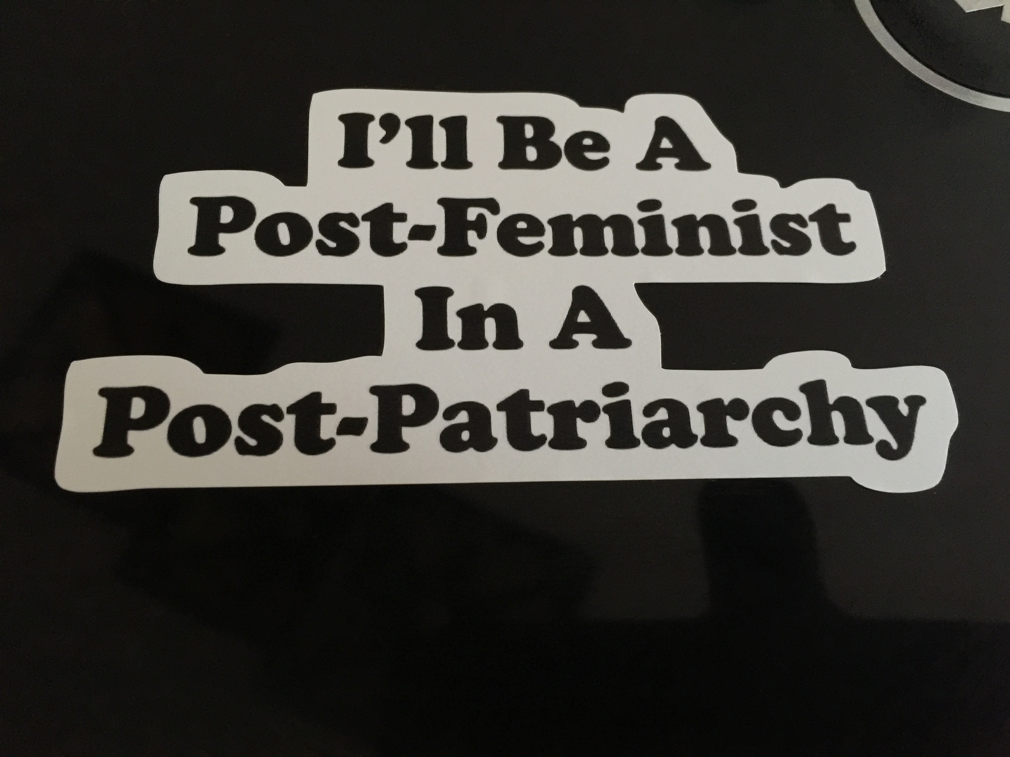 I'll be post-feminist in a post-patriarchy